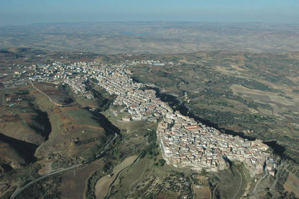 Veduta aerea della città di Irsina